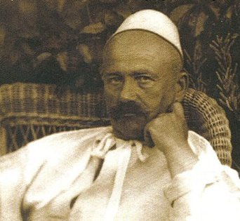 Joža Uprka (1861 - 1940), Český malíř a grafik.